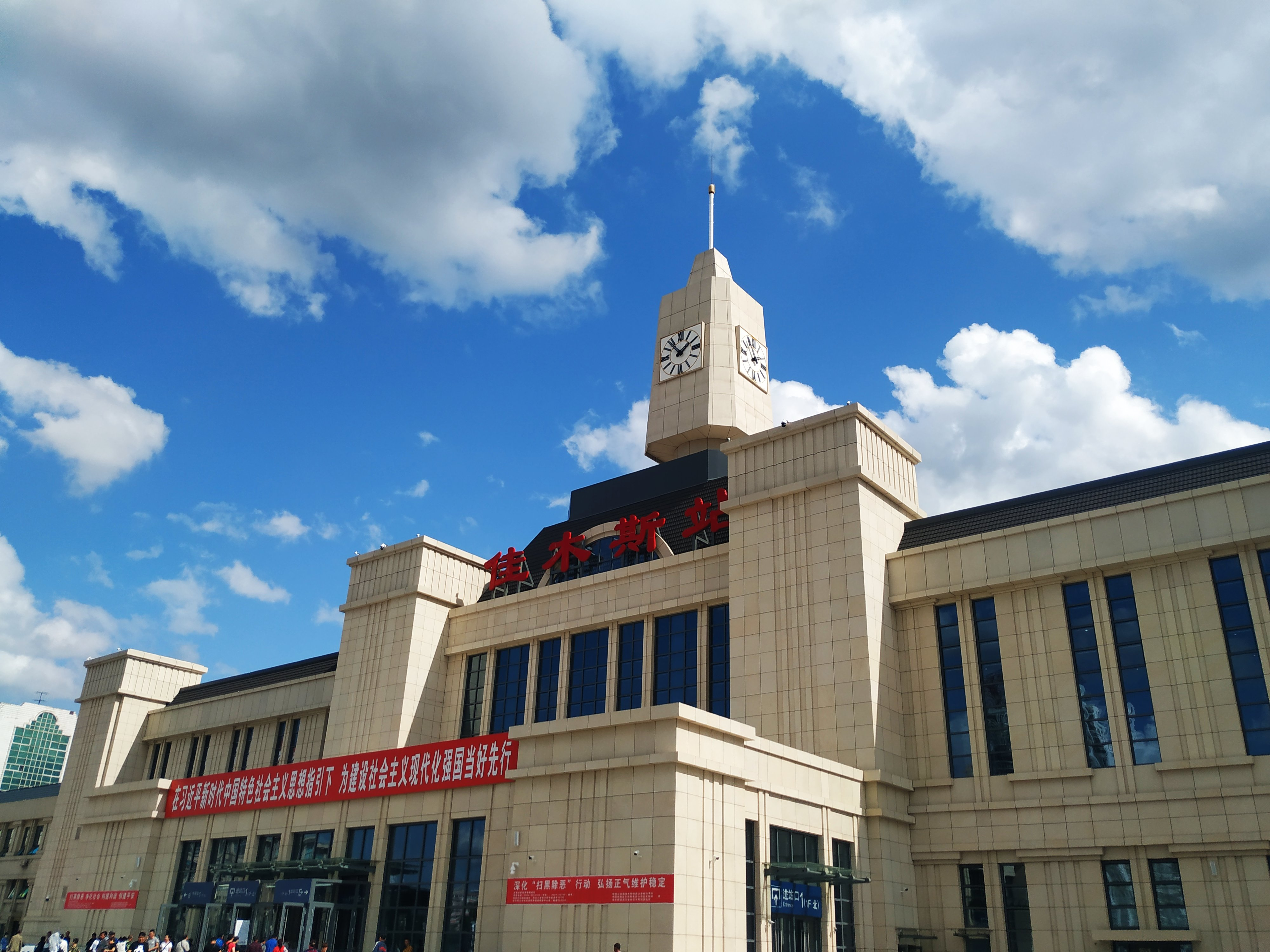 中文（中国大陆）: 佳木斯站南站房